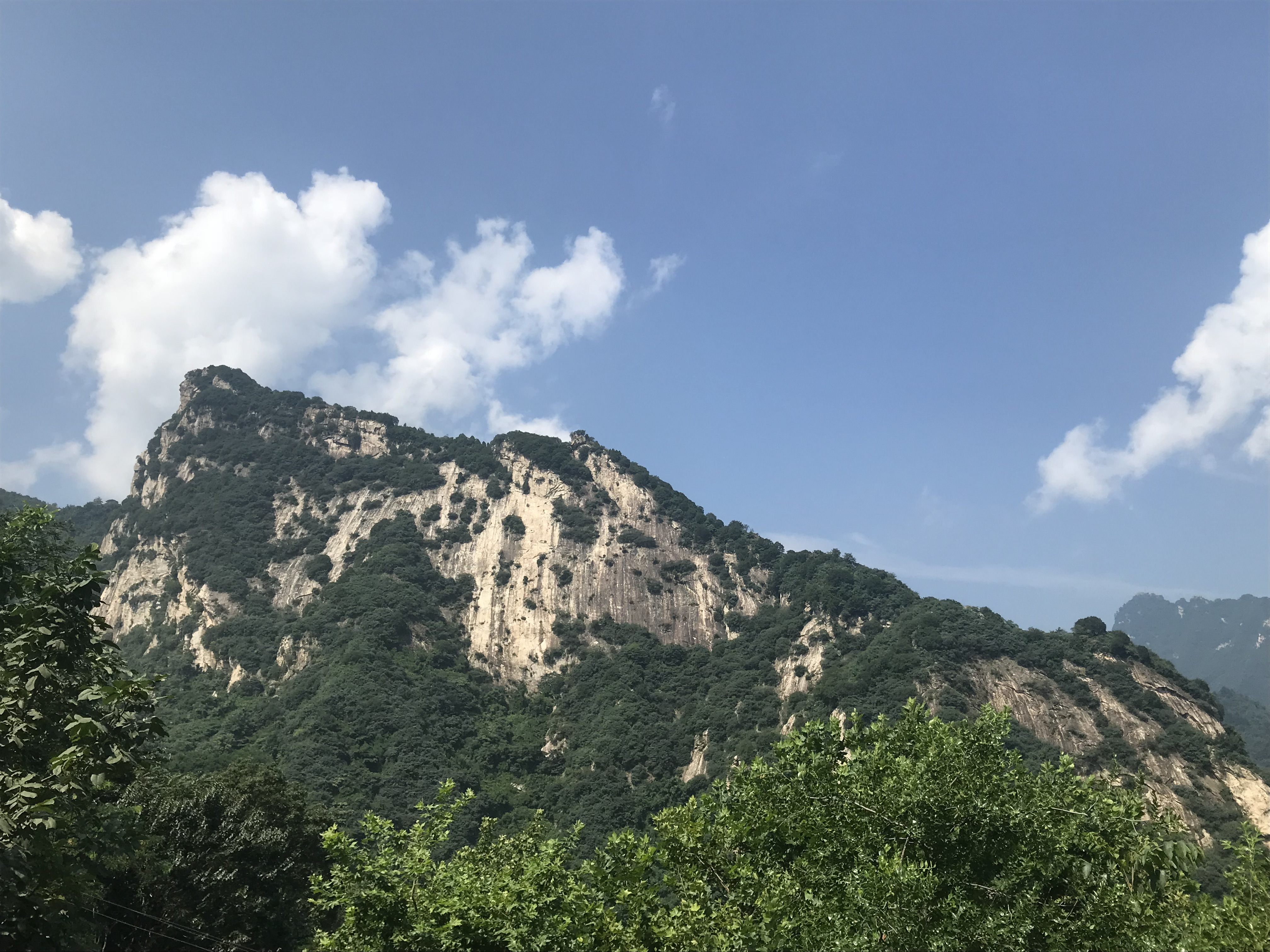 Cuihua Mountain (翠华山) in Xi'an of Shannxi Province, China